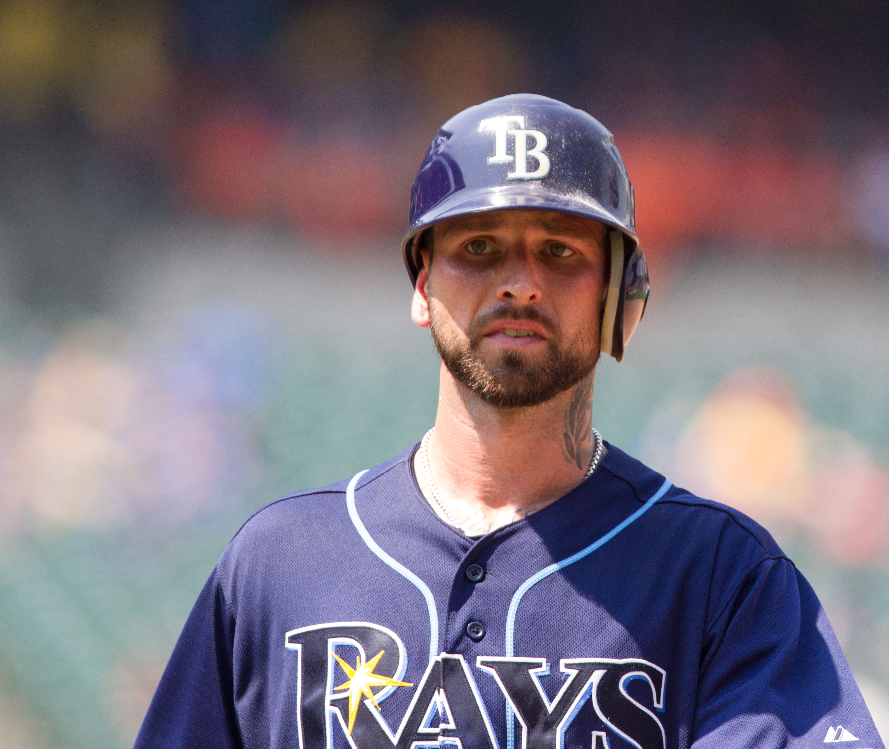 Ryan Roberts